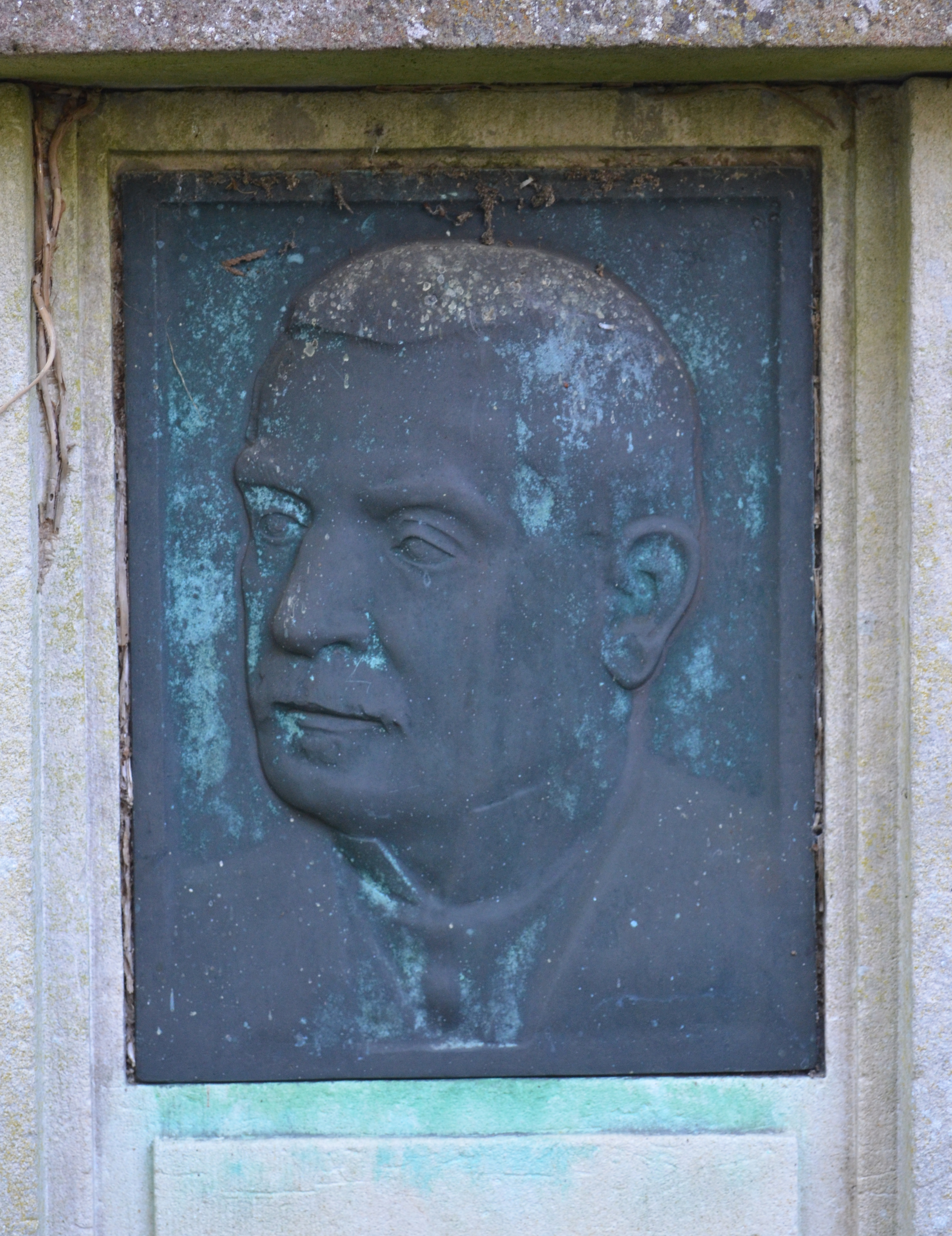 Limburg, Hauptfriedhof, Grab des Amtsapothekers Jakob Wolff, Detail